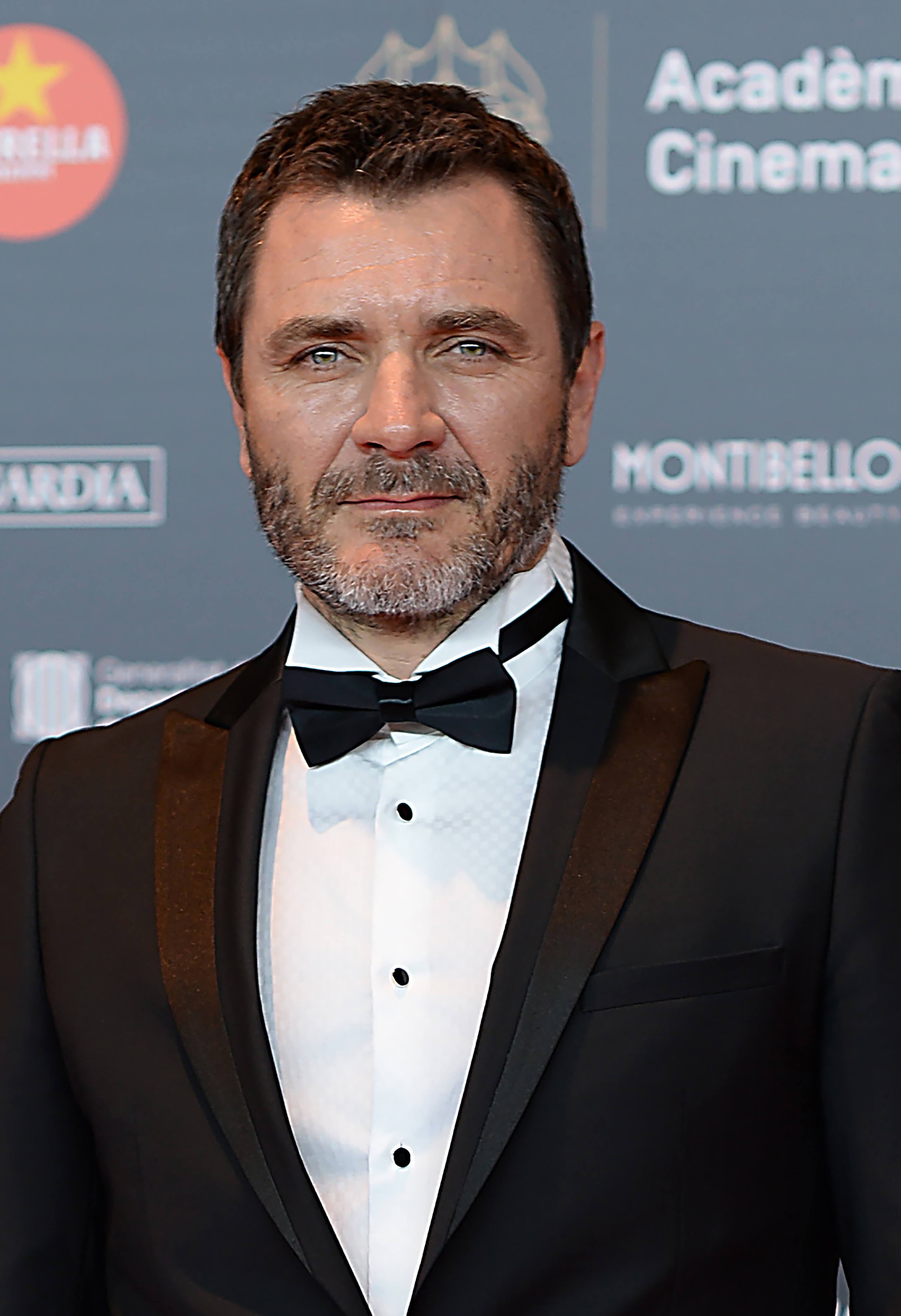 Àlex Brendemühl, actor, XII Premis Gaudí (2020)